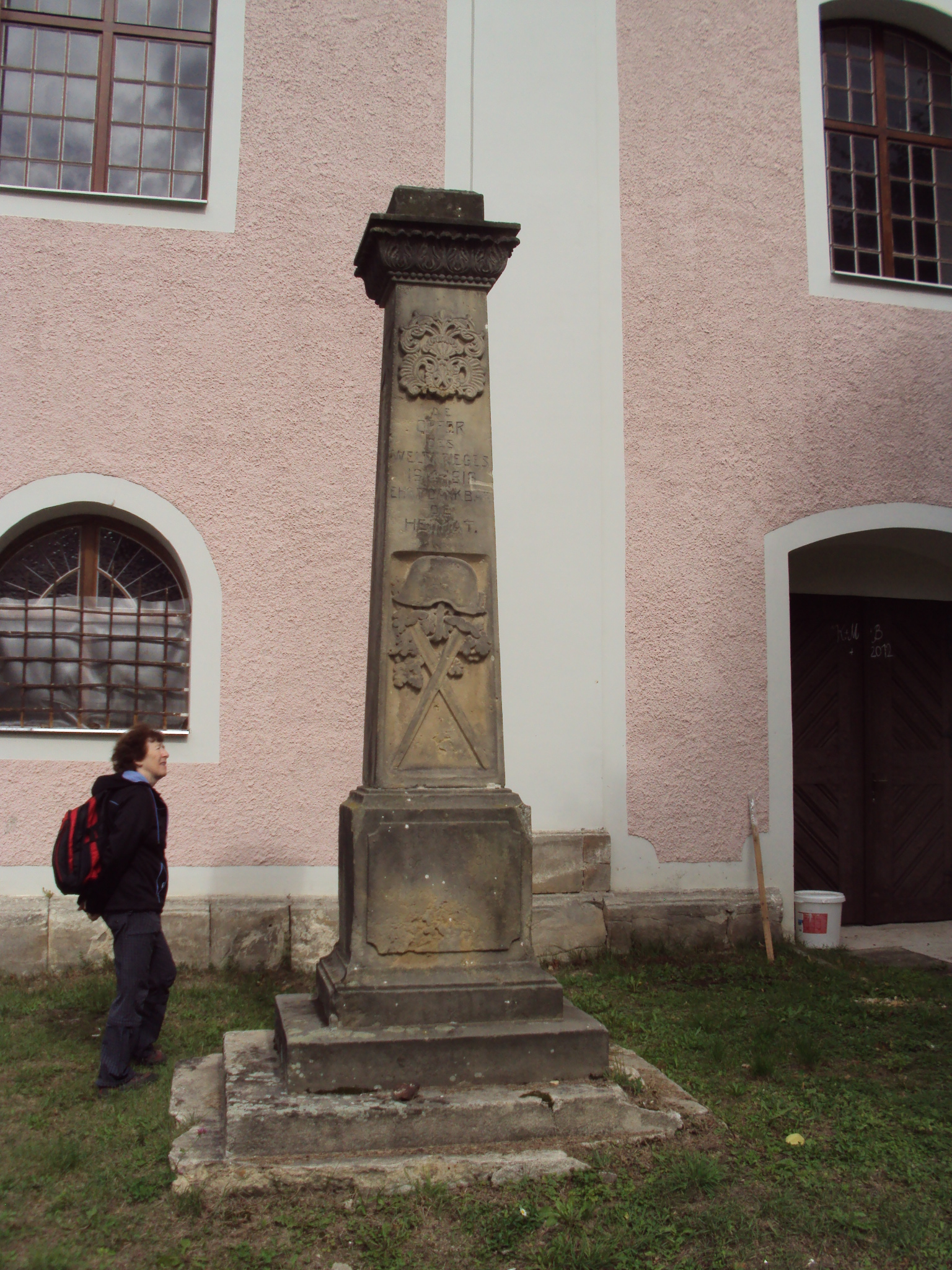 Asi 4 metry od kostela je toto dílo, neoznačené